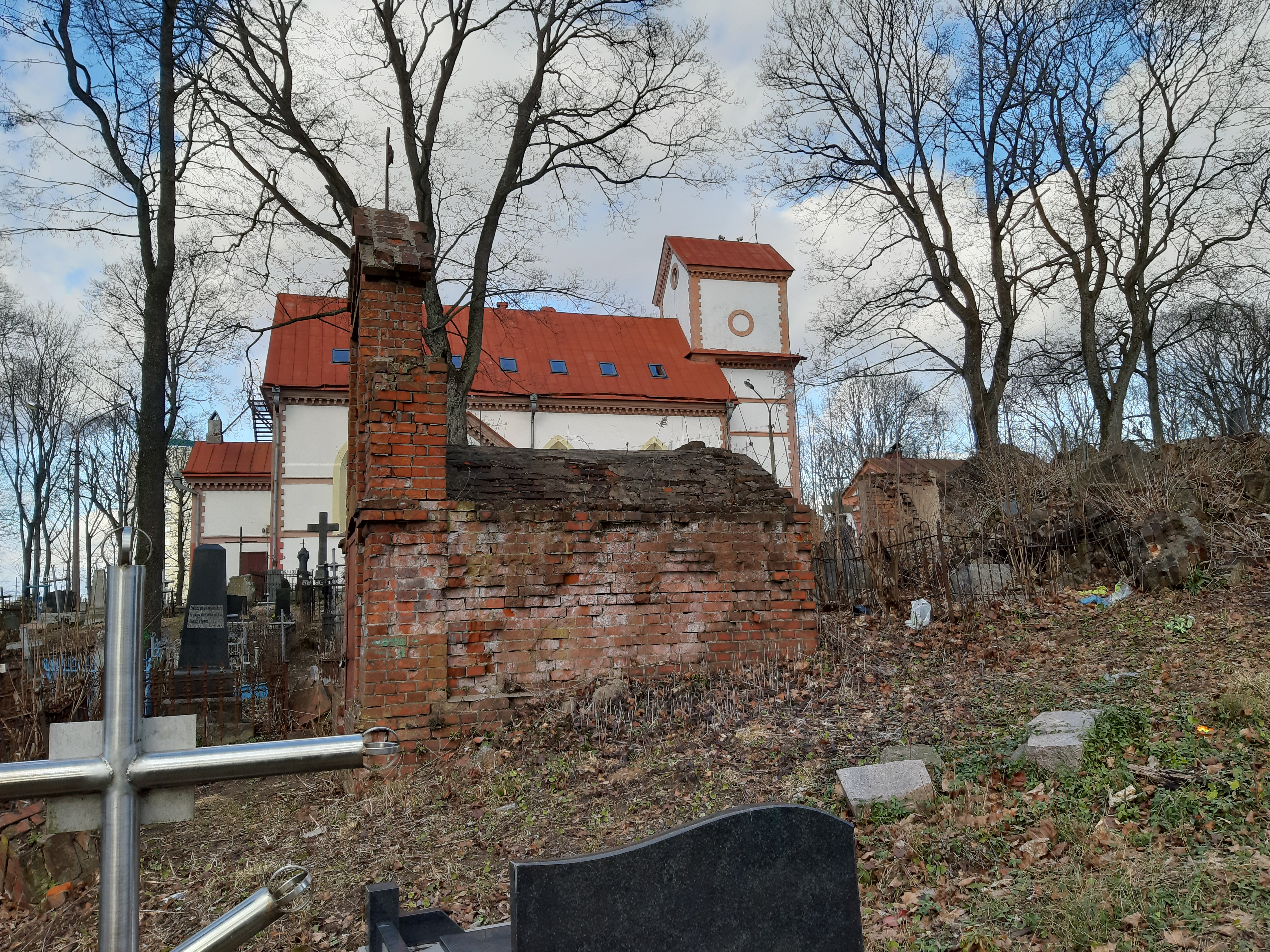 Мінск. Кальварыйскія могілкі. 2020